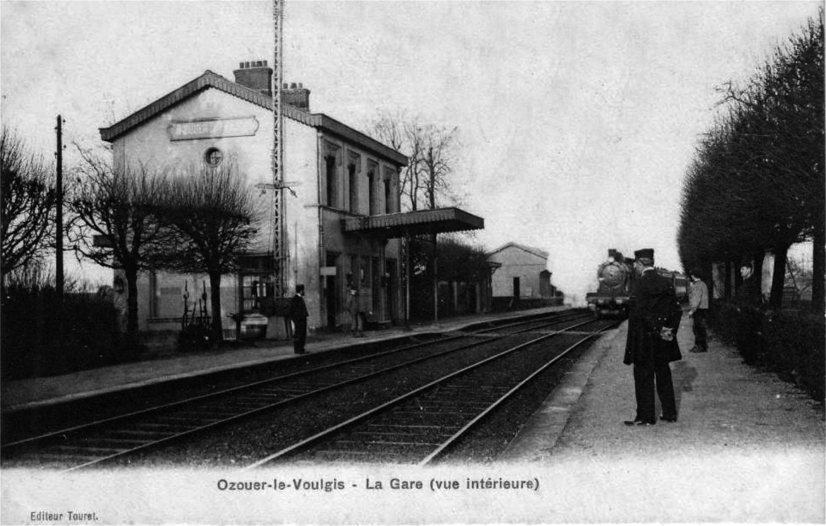 L'intérieur de la gare d'Ozouer-le-Voulgis vers 1900, avec le bâtiment voyageurs, les voies, les quais et un train à vapeur entrant en gare.